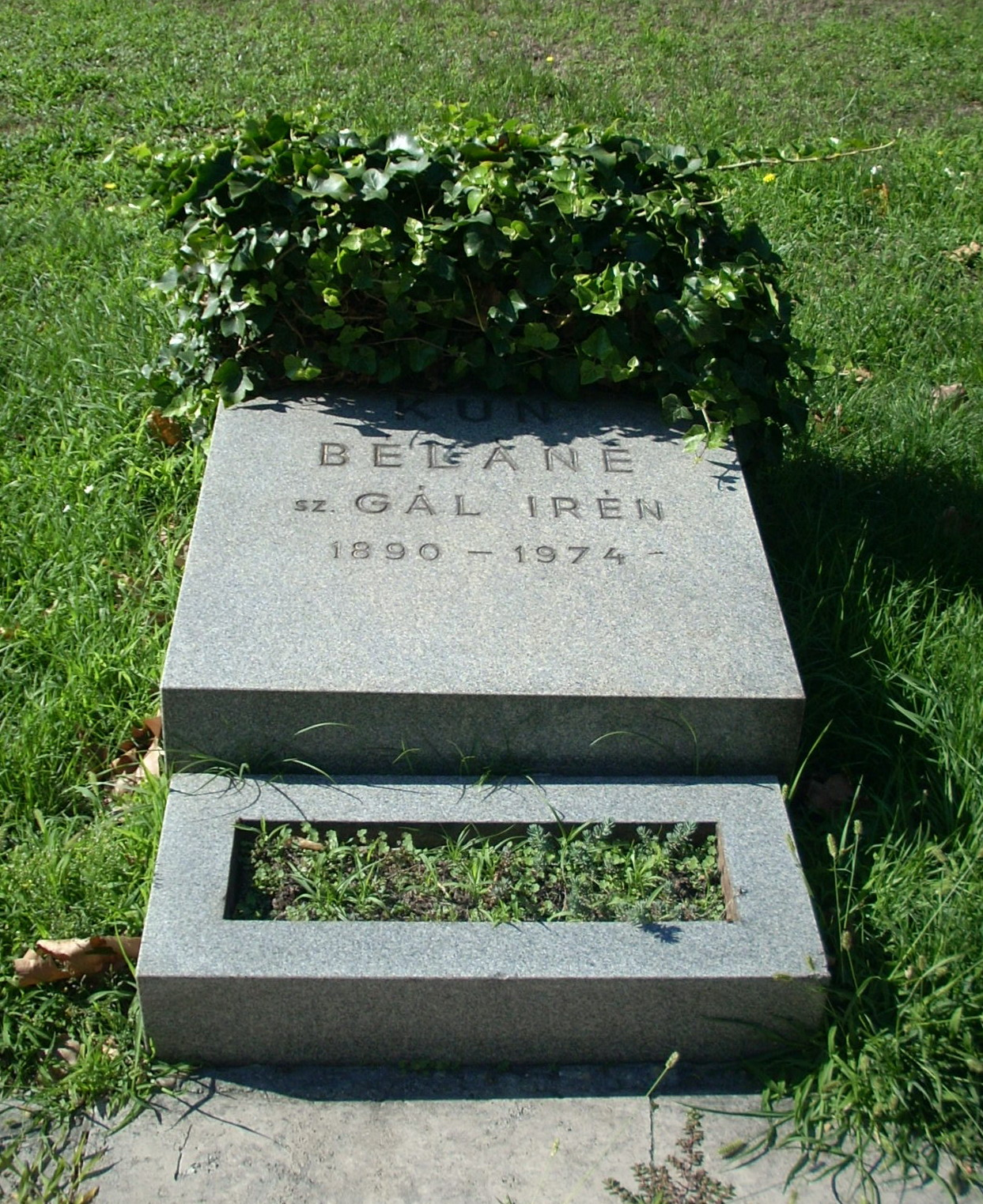 Kun Béláné Gál Irén zongoratanár sírja a Kerepesi temető Munkásmozgalmi Pantheonja előtti soron (Budapest)